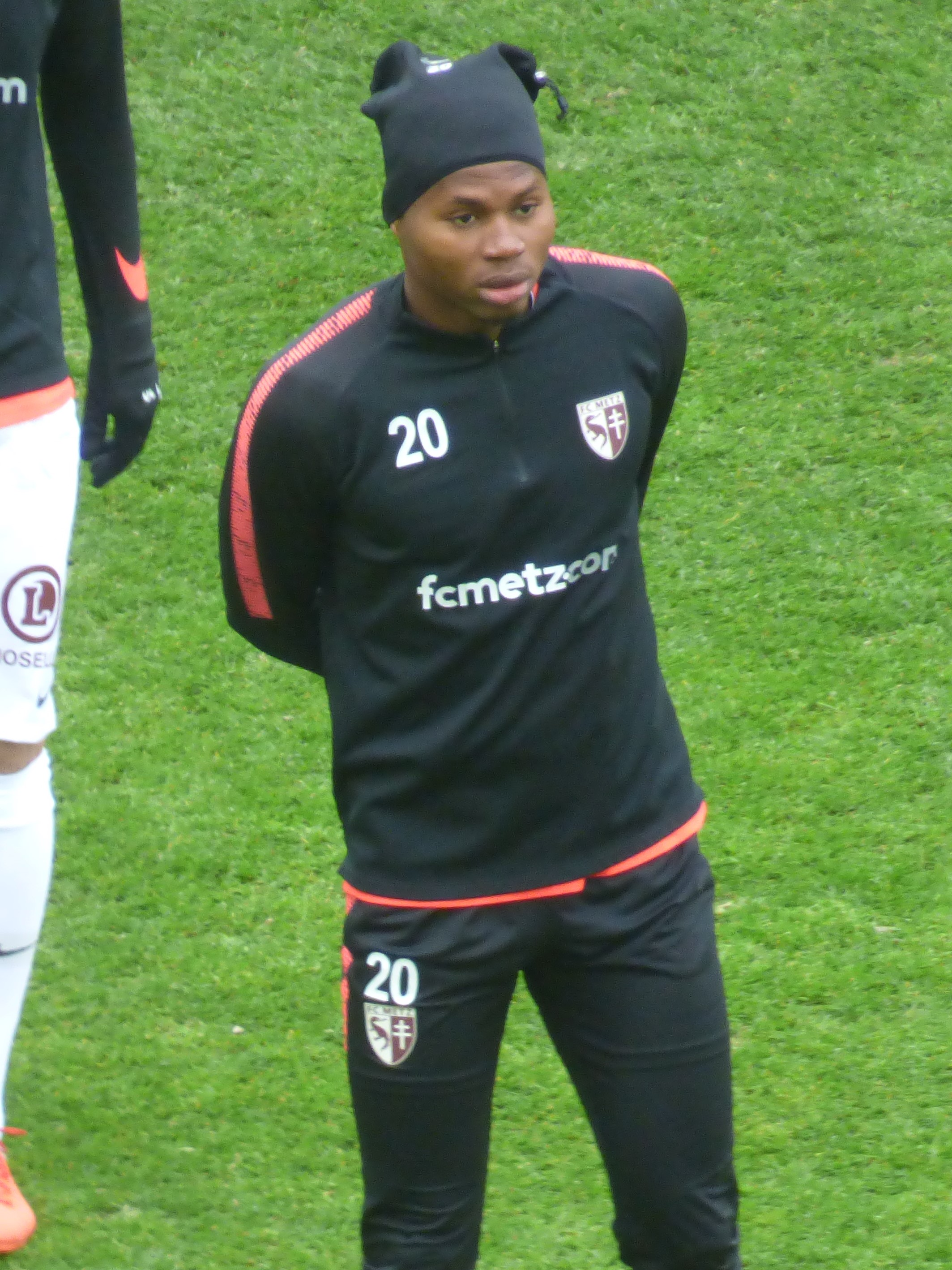 Habib Diallo avant le match RC Lens / FC Metz, comptant pour la vingt-quatrième journée du championnat de France de Ligue 2 2018-2019, le 9 février 2019, au Stade Bollaert-Delelis.